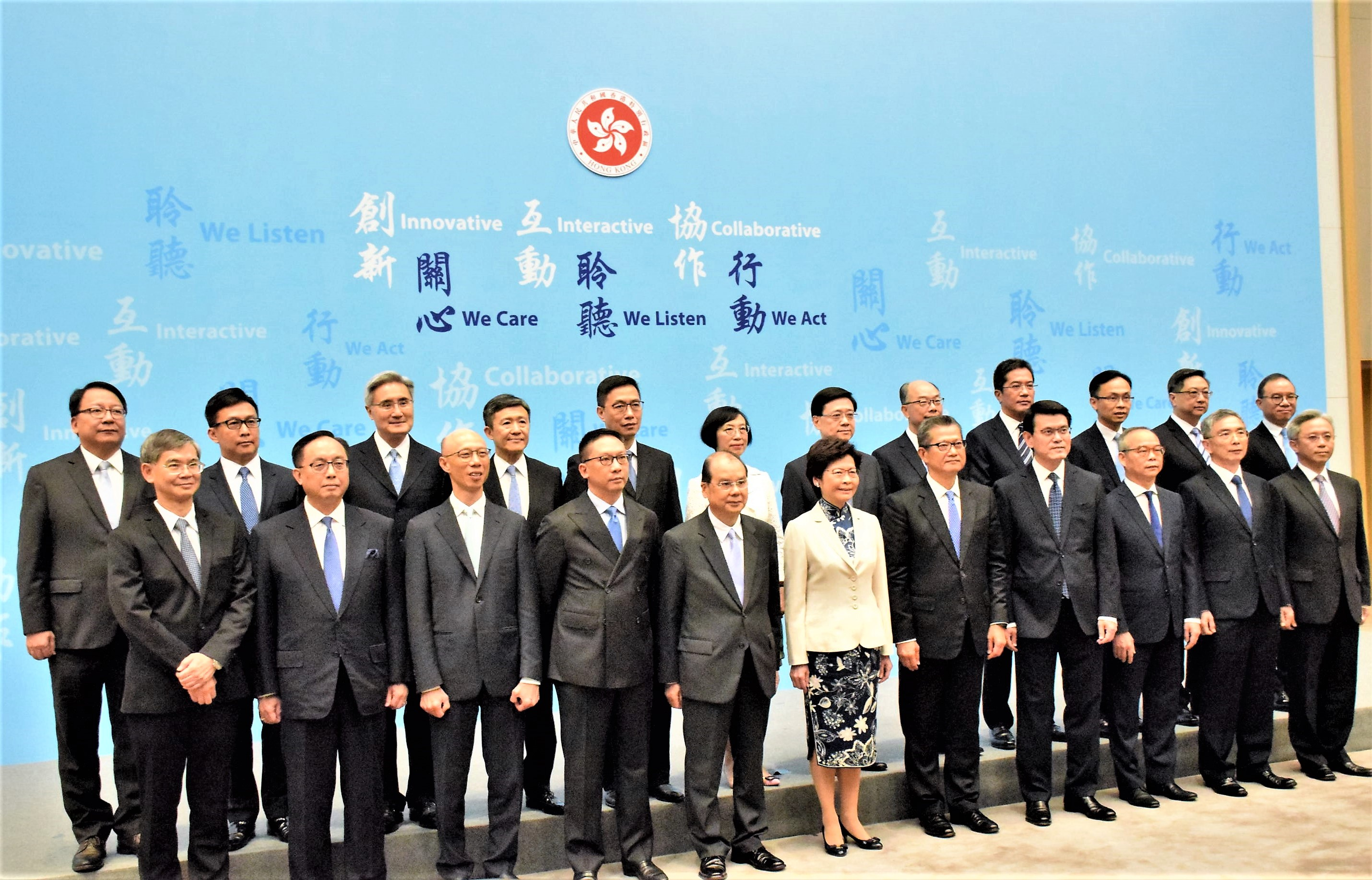 中文（香港）: 香港候任特首林鄭月娥與新班子會見傳媒。(美國之音湯惠芸)